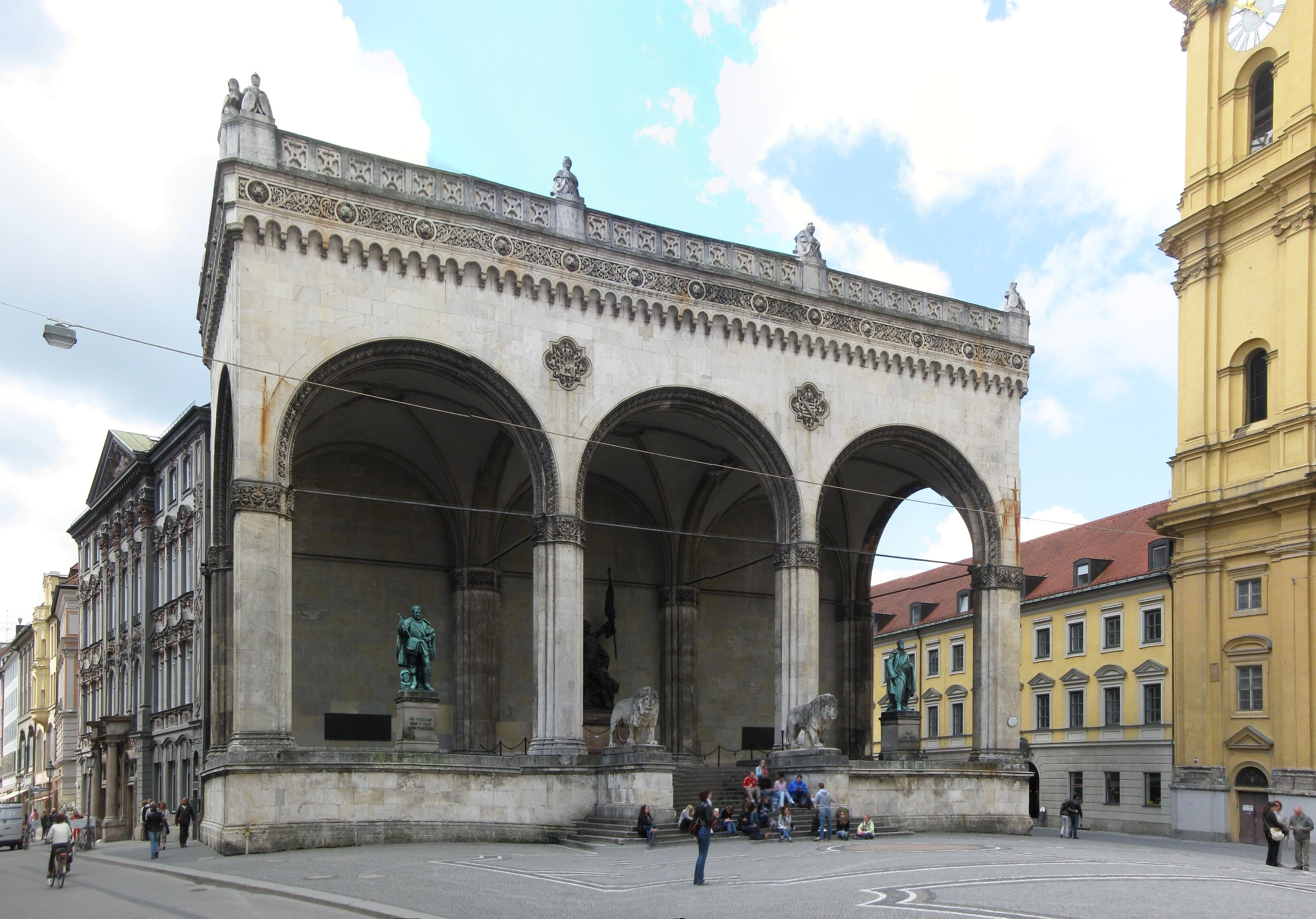 Odeonsplatz; Feldherrnhalle, Loggia mit dreiseitig offenen Rundbogenarkaden und großer Freitreppe im Norden, Kalksteinquaderbau mit reichem bauplastischem Dekor, von Friedrich von Gärtner, 1841-44, Behebung der Kriegsschäden, 1950-1962; Bronzestandbilder auf Granitpostamenten der Heerführer Johann Tzerklas Graf von Tilly und Carl Philipp Fürst von Wrede, nach Entwürfen von Ludwig Schwanthaler, gegossen von Ferdinand von Miller d. Ä., enthüllt 1844; Bayerisches Armeedenkmal, Bronzefigurengruppe auf Granitsockel, von Ferdinand von Miller d. J., bez. 1892; zwei Löwen, neuklassizistische Tierplastiken in Marmor, von Wilhelm von Rümann, 1906.